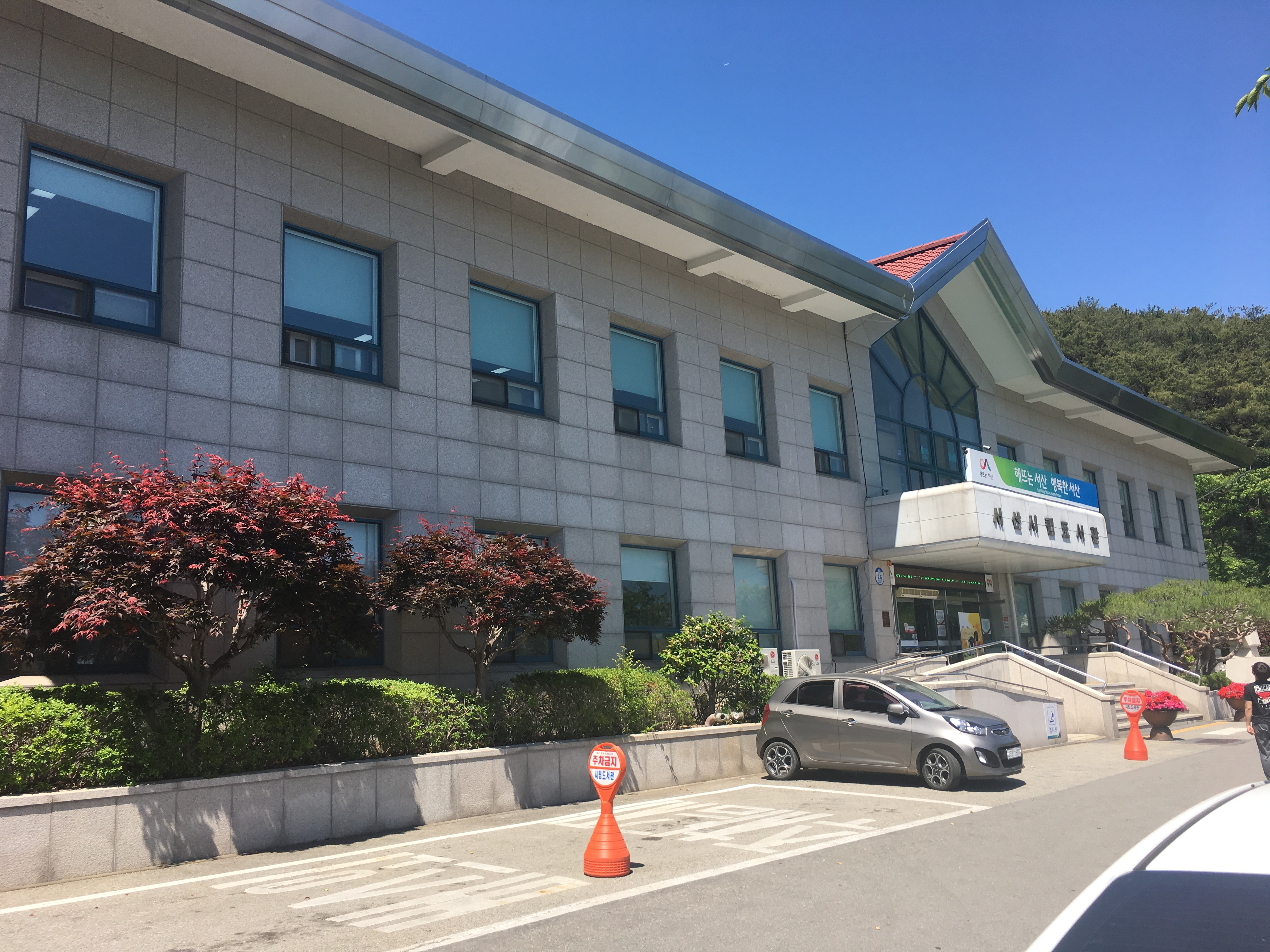 외부전경사진